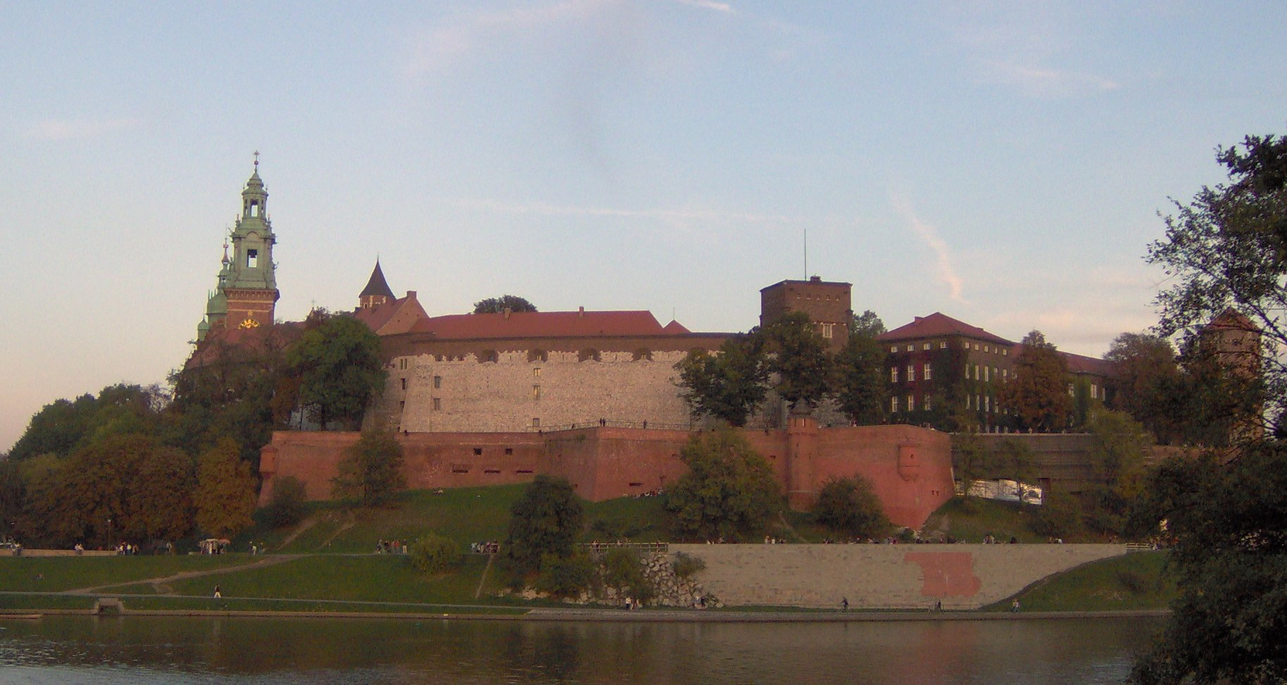 Wawel - widok od strony Wisły